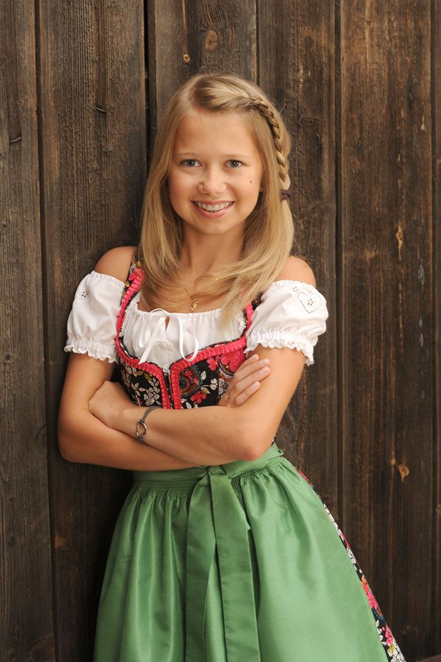 Laura Kamhuber Album Foto